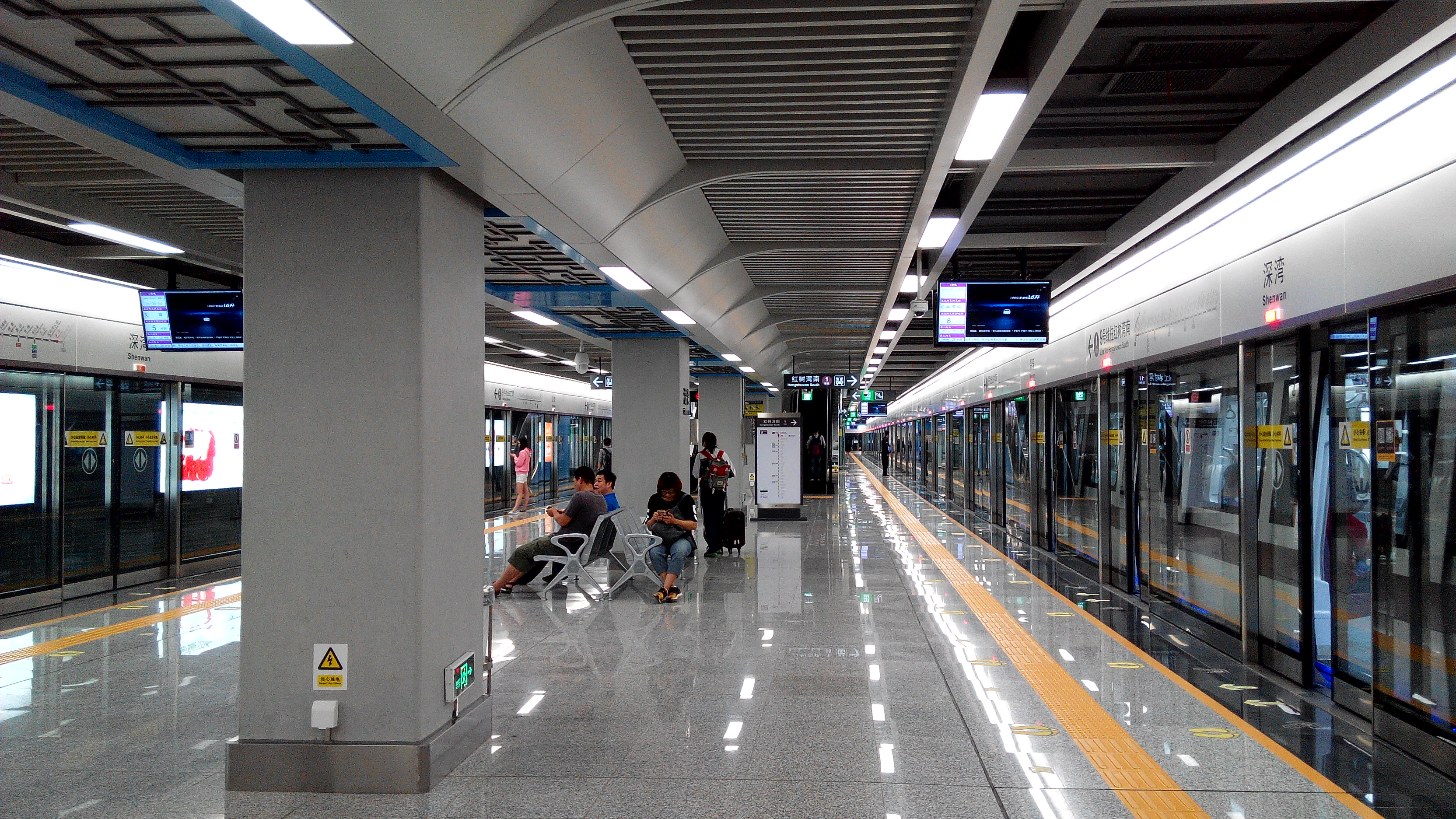 深圳地铁9号线 深湾站站台